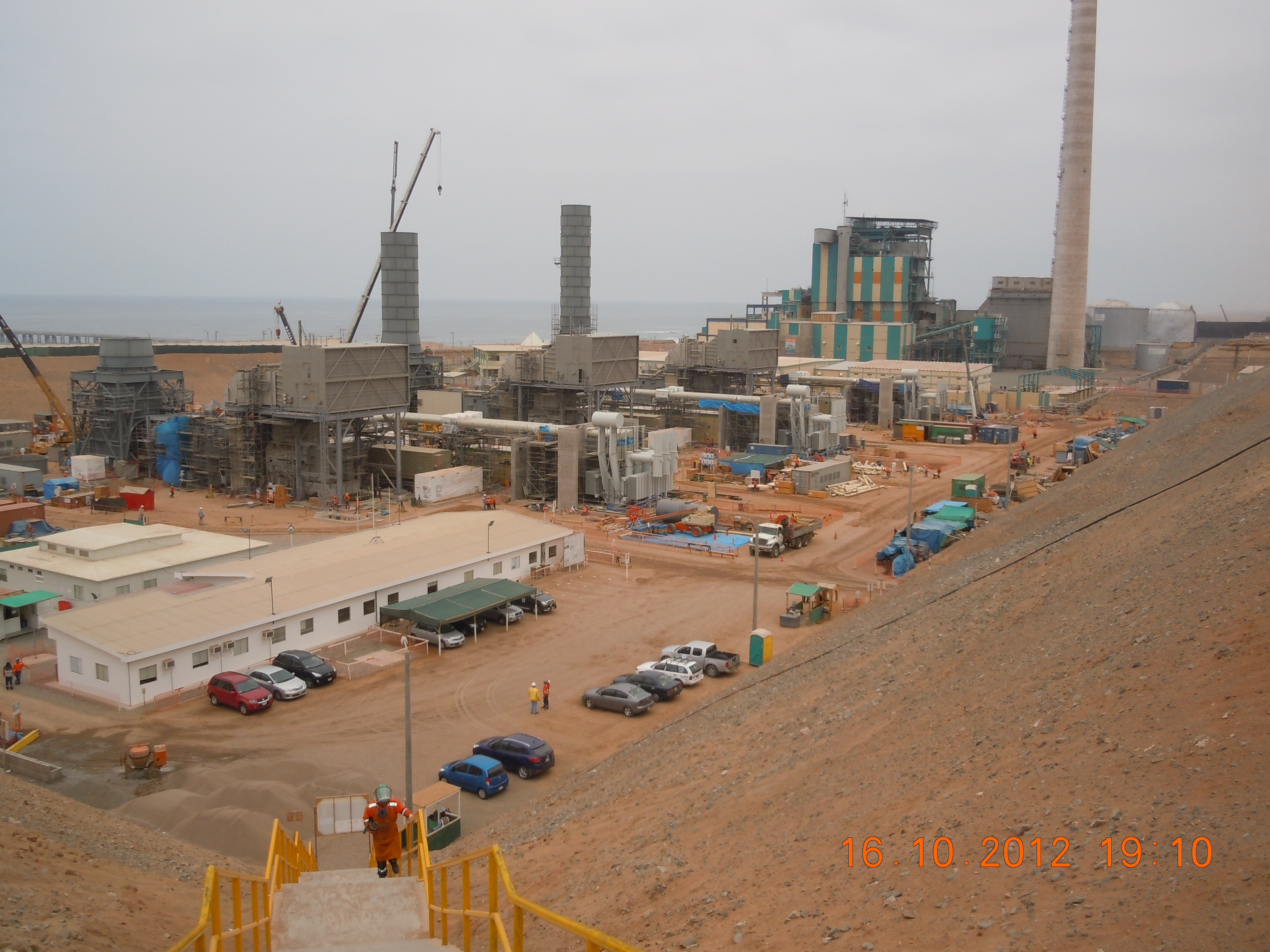 ENERSUR-ILO Peakly PP